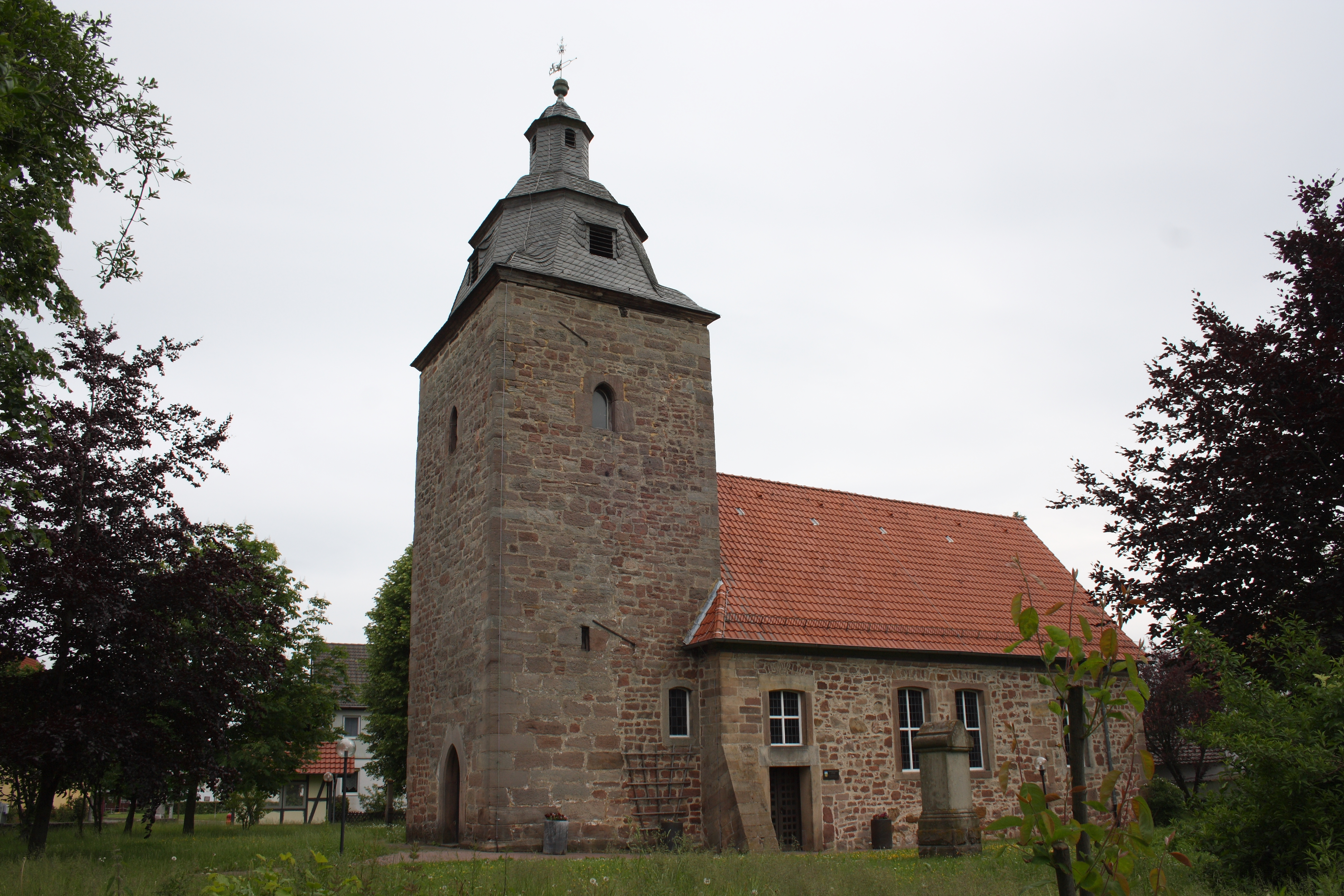 Evangelische Pfarrkirche in Velmeden, einem Ortsteil von Hessisch Lichtenau im Werra-Meißner-Kreis (Hessen)